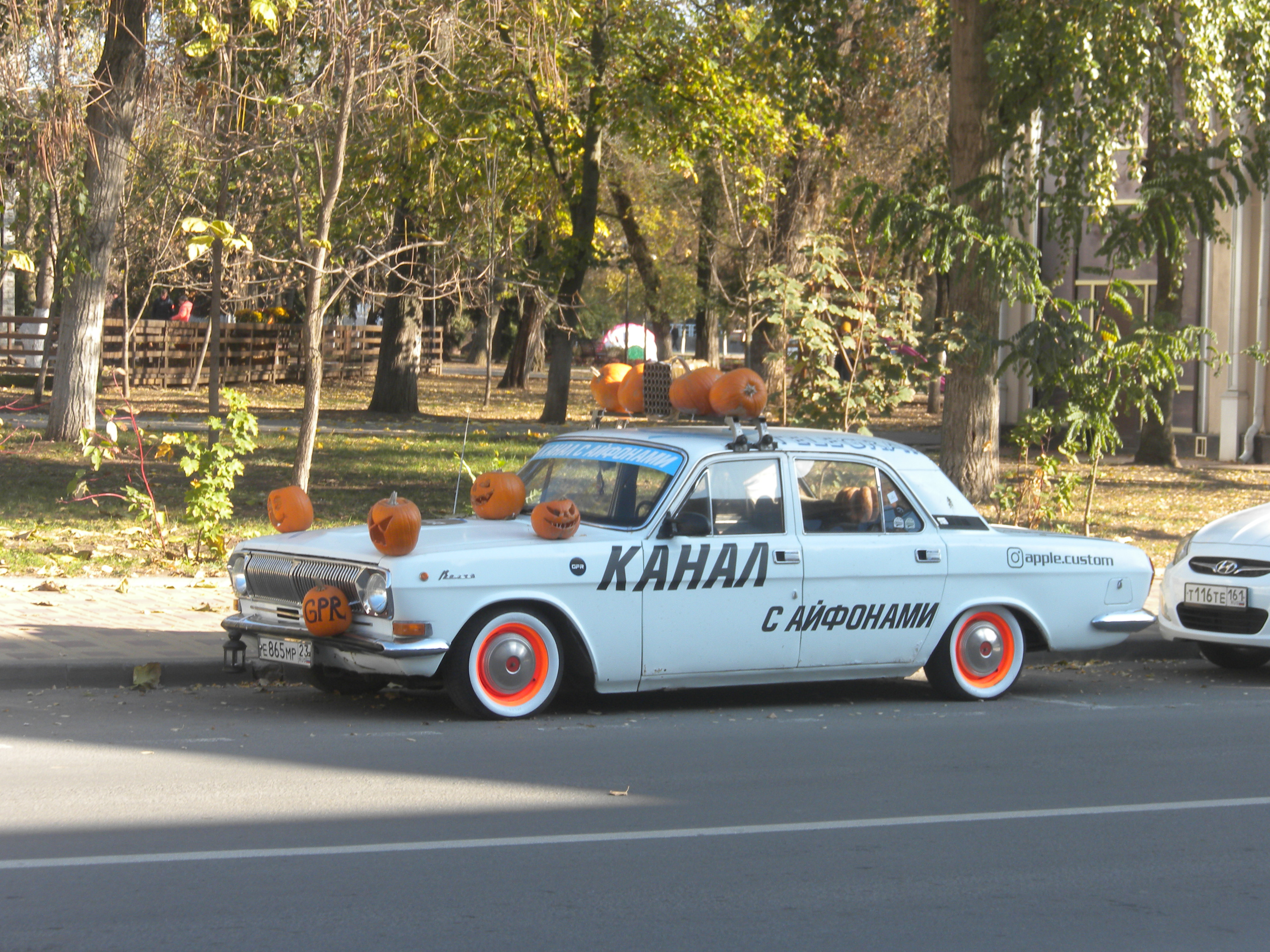 Ростов-на-Дону, Кировский проспект, автомобиль после Хеллоуина